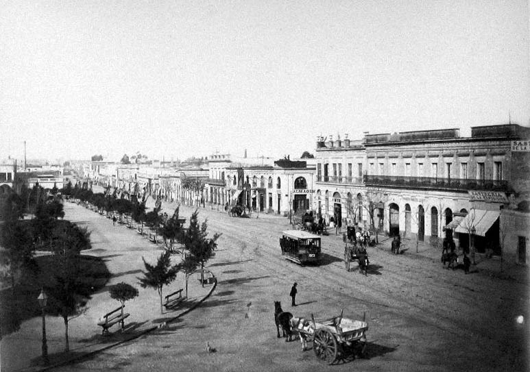 Calle Rivadavia, en la Ciudad de Buenos Aires